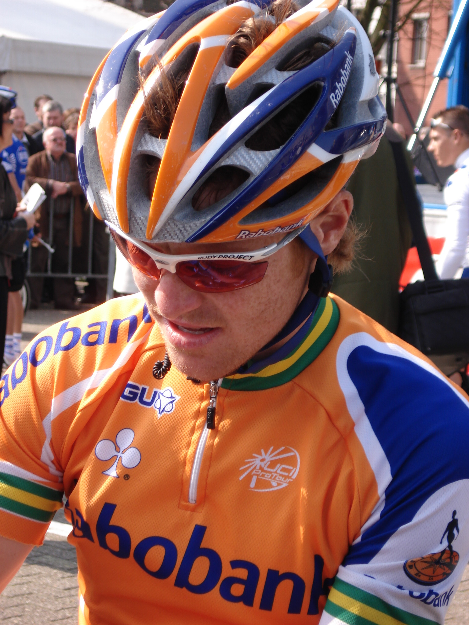 William Walker bij start Brabantse Pijl 2007 (1 april 2007). Uit Privé-collectie